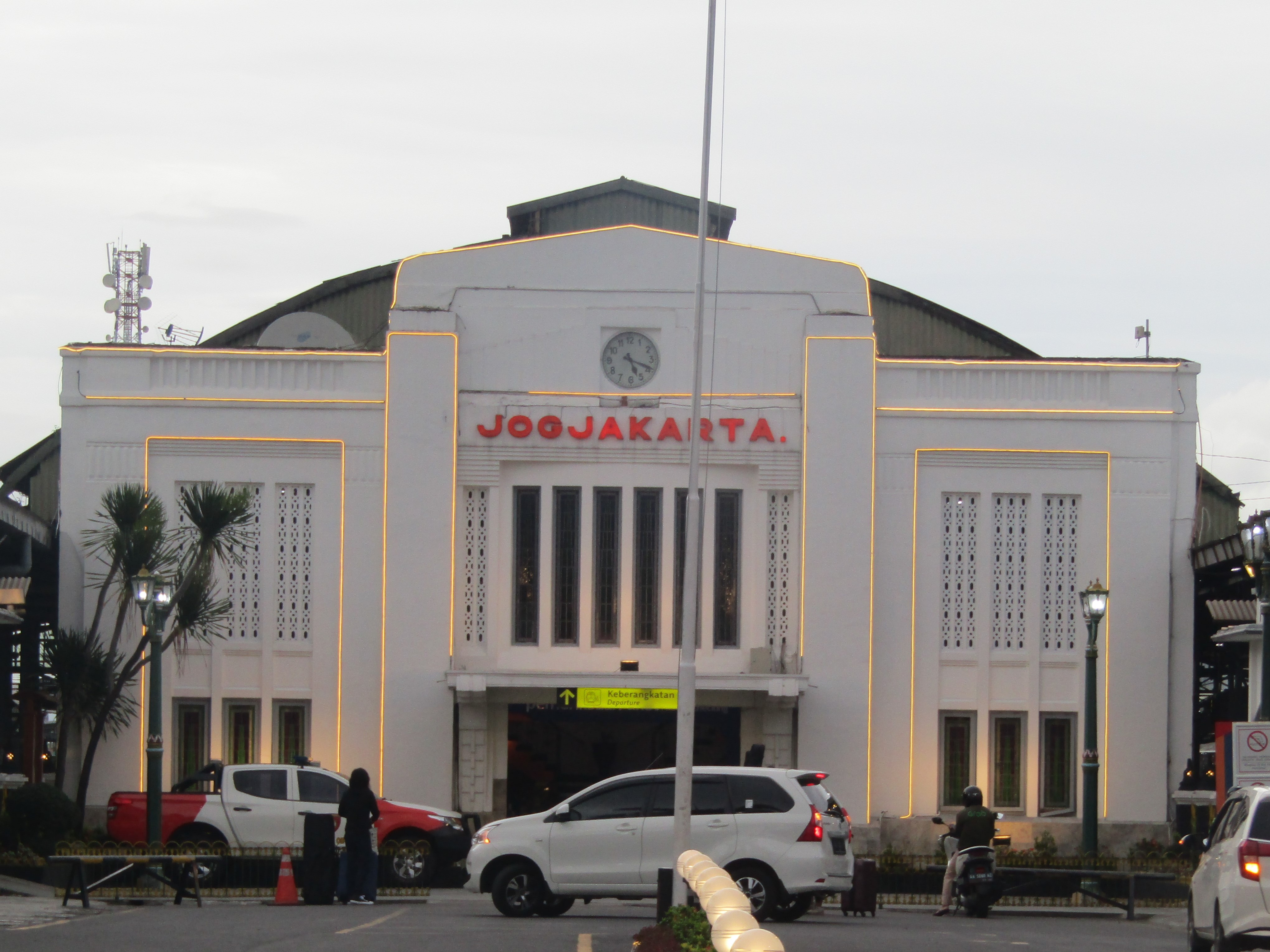 Stasiun Tugu, 2020